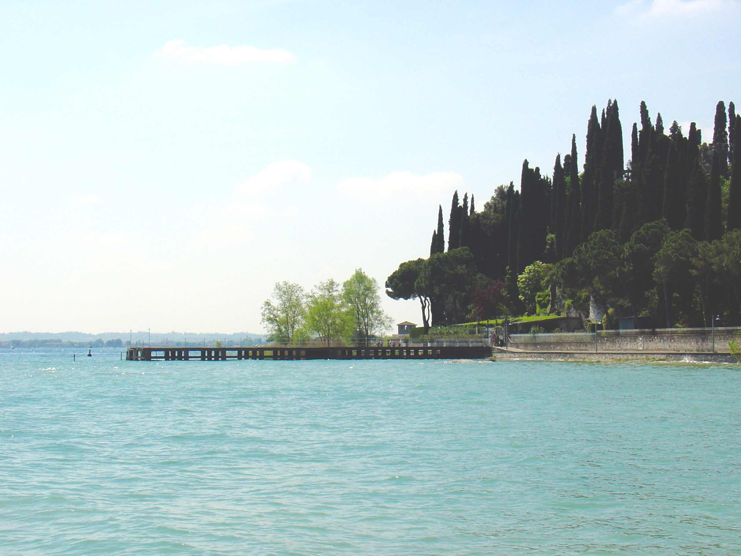 Steg des Hotels VILLA CORTINE in Sirmione